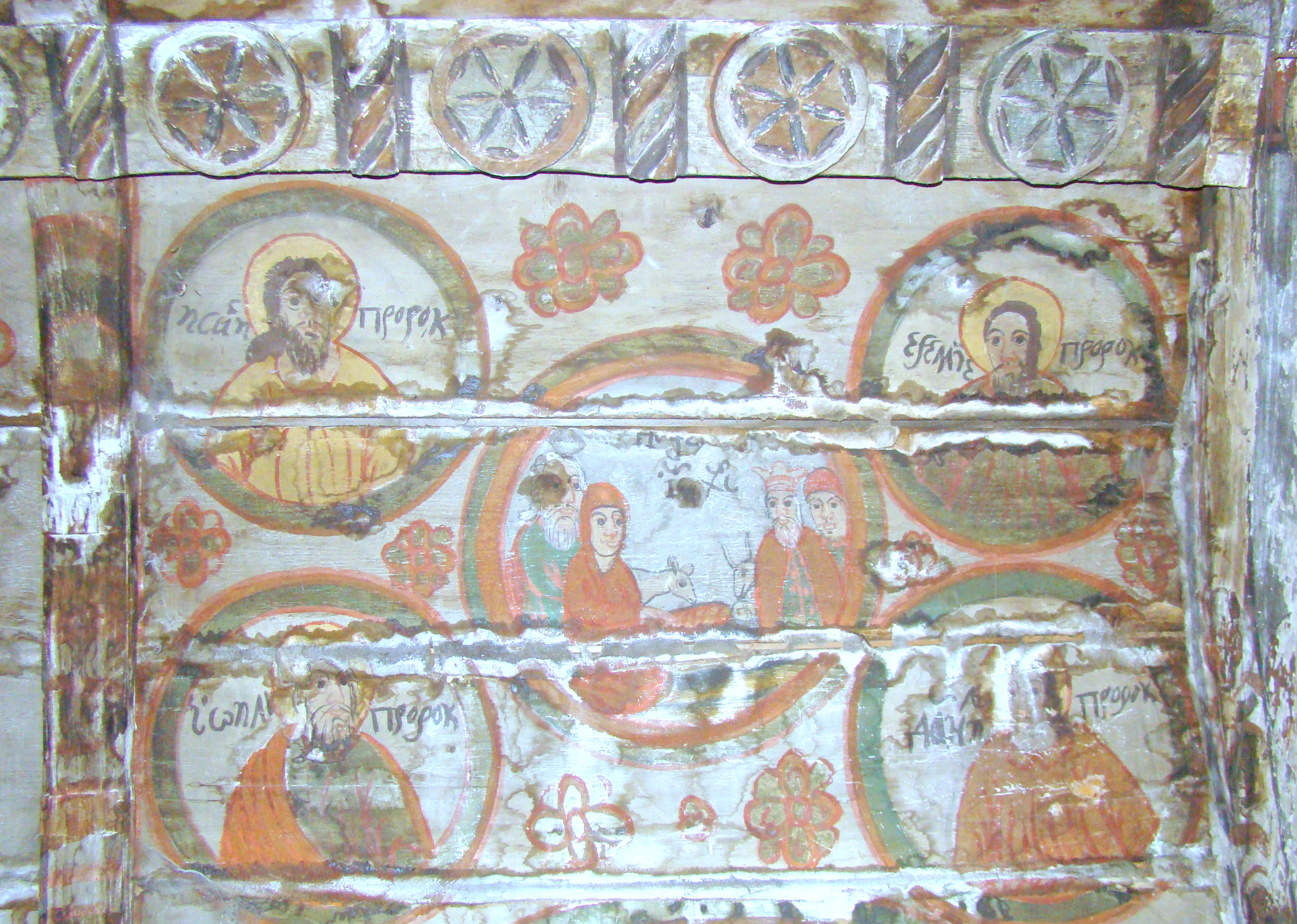 Biserica de lemn din Gârbău Dejului